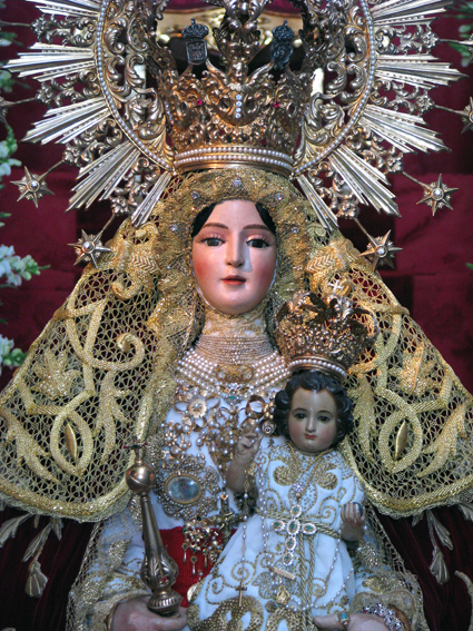 Imagen de Nuestra Señora de la Cabeza, Reina y Señora de Rute (Córdoba)